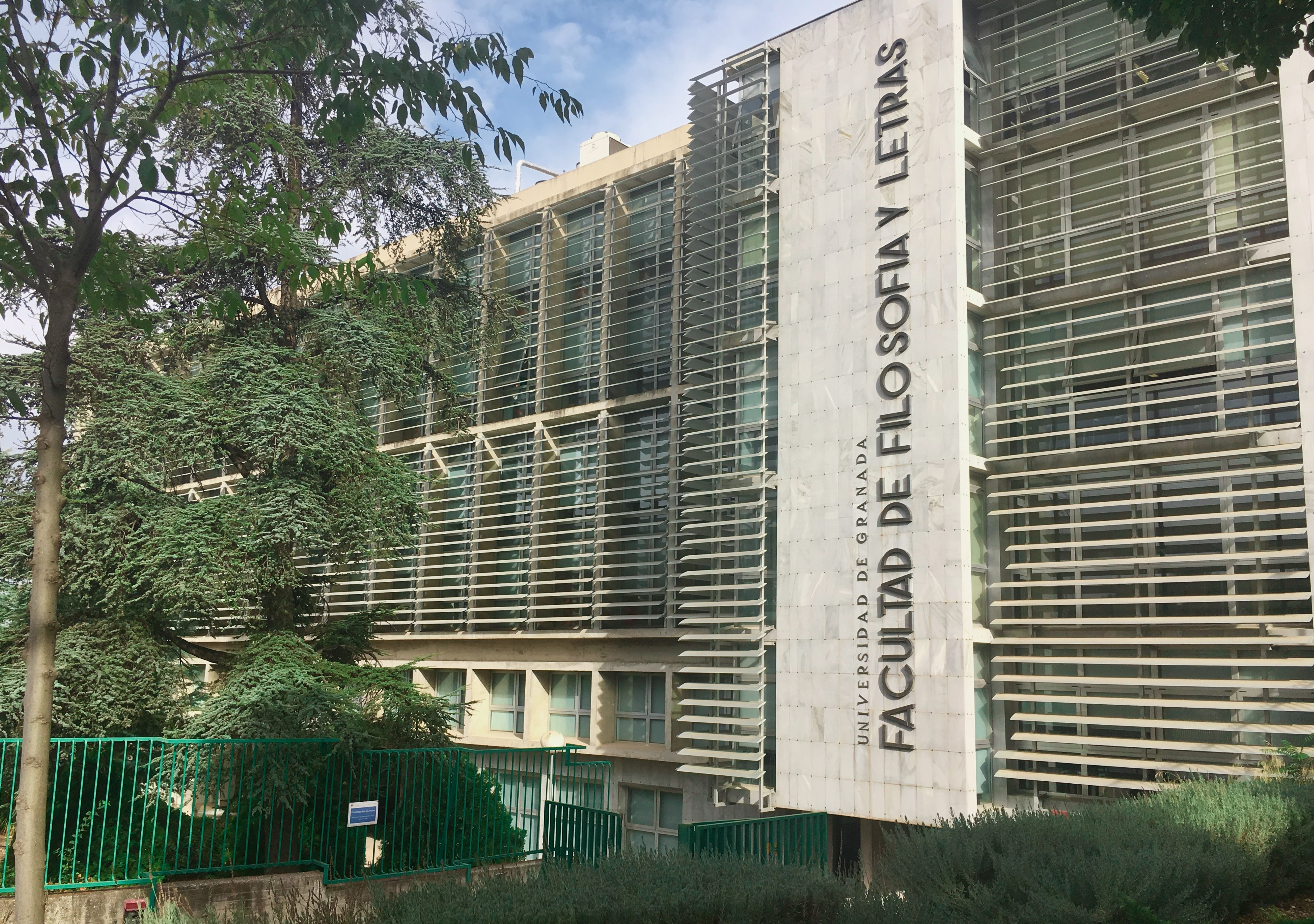 Vista lateral del edificio de la Facultad de Filosofía y Letras de la Universidad de Granada, en el Campus de Cartuja